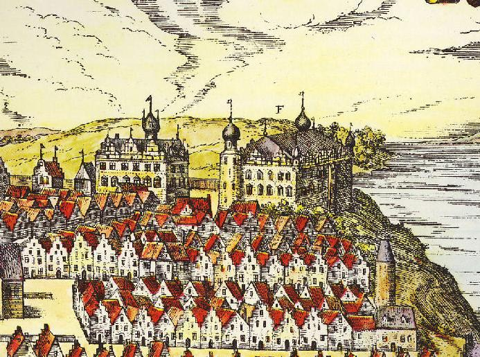 Schloss und Stadt Kiel, Ausschnitt aus dem Stich der Stadt Kiel von Braun u. Hogenberg, 1572/1618